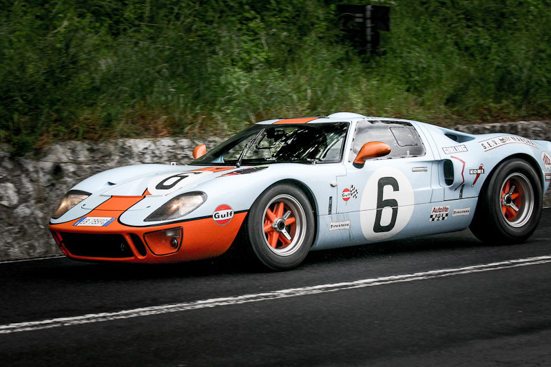 1000 miglia 2012 - SS della Futa . Pianoro (BO)